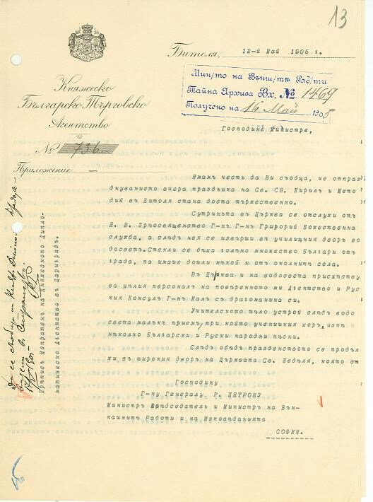 Документ на българското търговско агенство в Битоля от 1905 г.